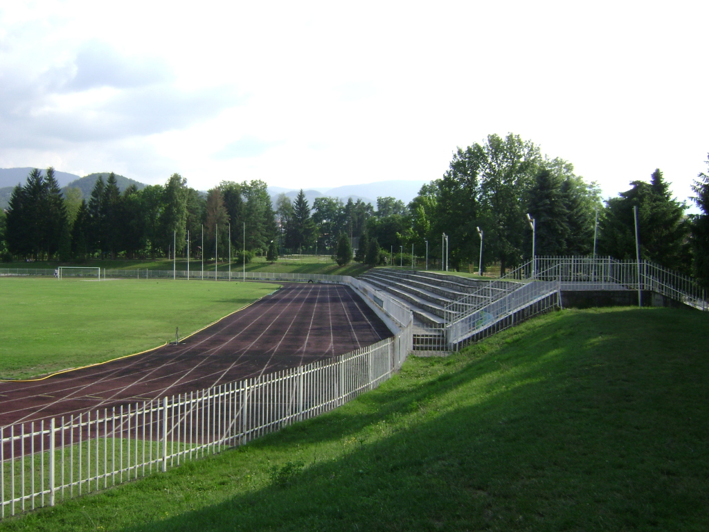 Српски (ћирилица): Градски стадион, Бајина Башта, Србија.